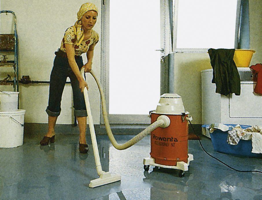 Rowenta Staubsauger